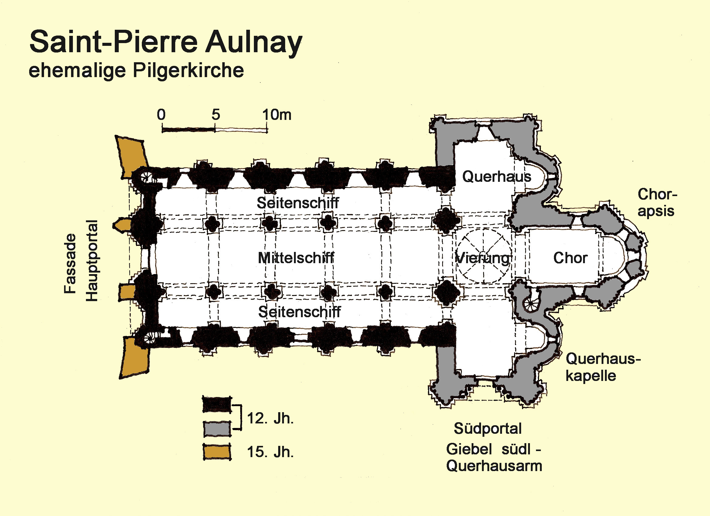 Aulnay.Grundriss,Handskizze